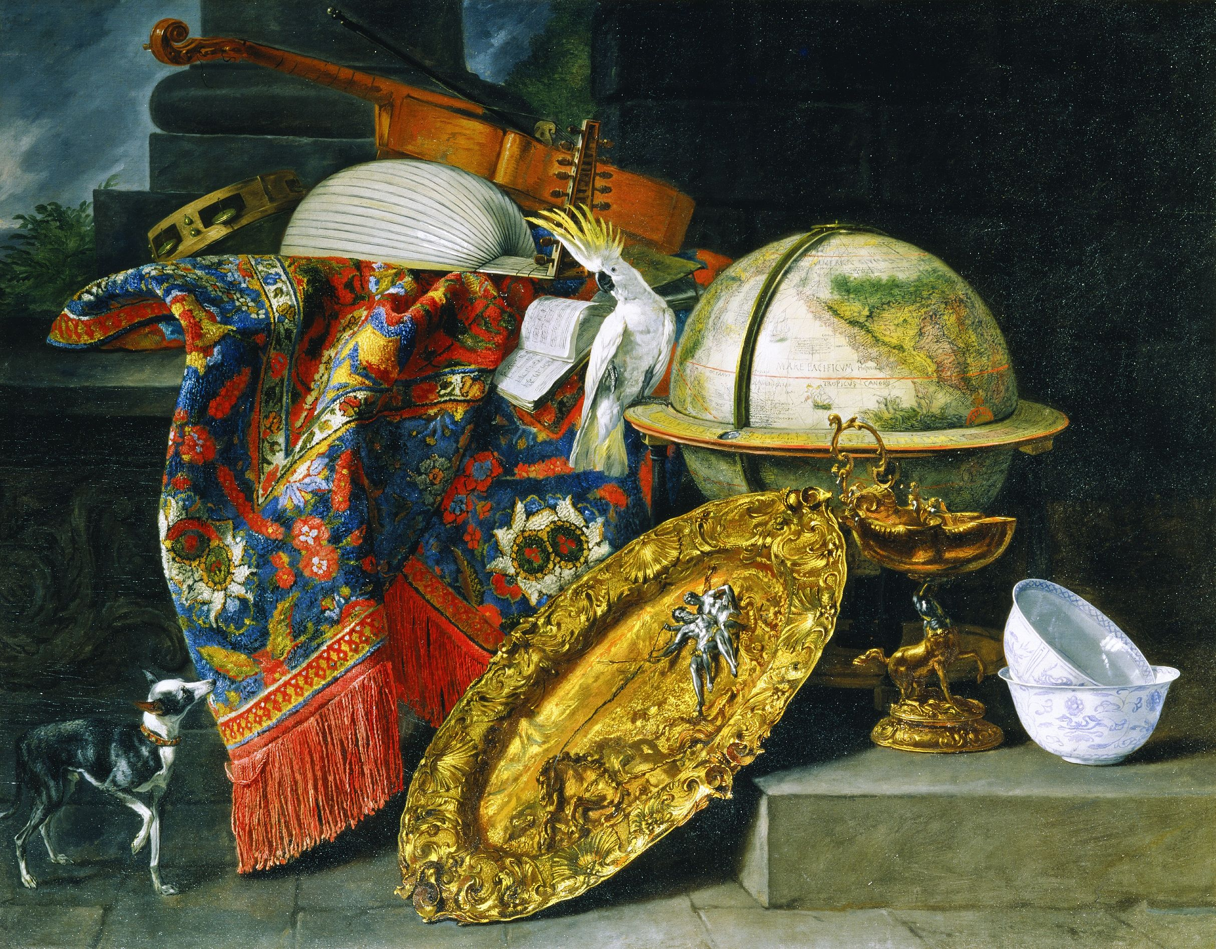 Martwa natura z globusem i papugą kakadutitle QS:P1476,pl:"Martwa natura z globusem i papugą kakadu" label QS:Lpl,"Martwa natura z globusem i papugą kakadu"